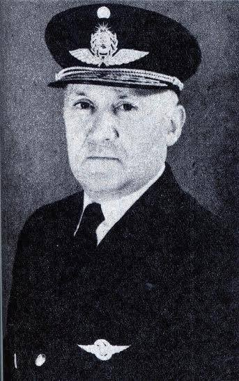 Retrato del Brigadier General Héctor Fautario.